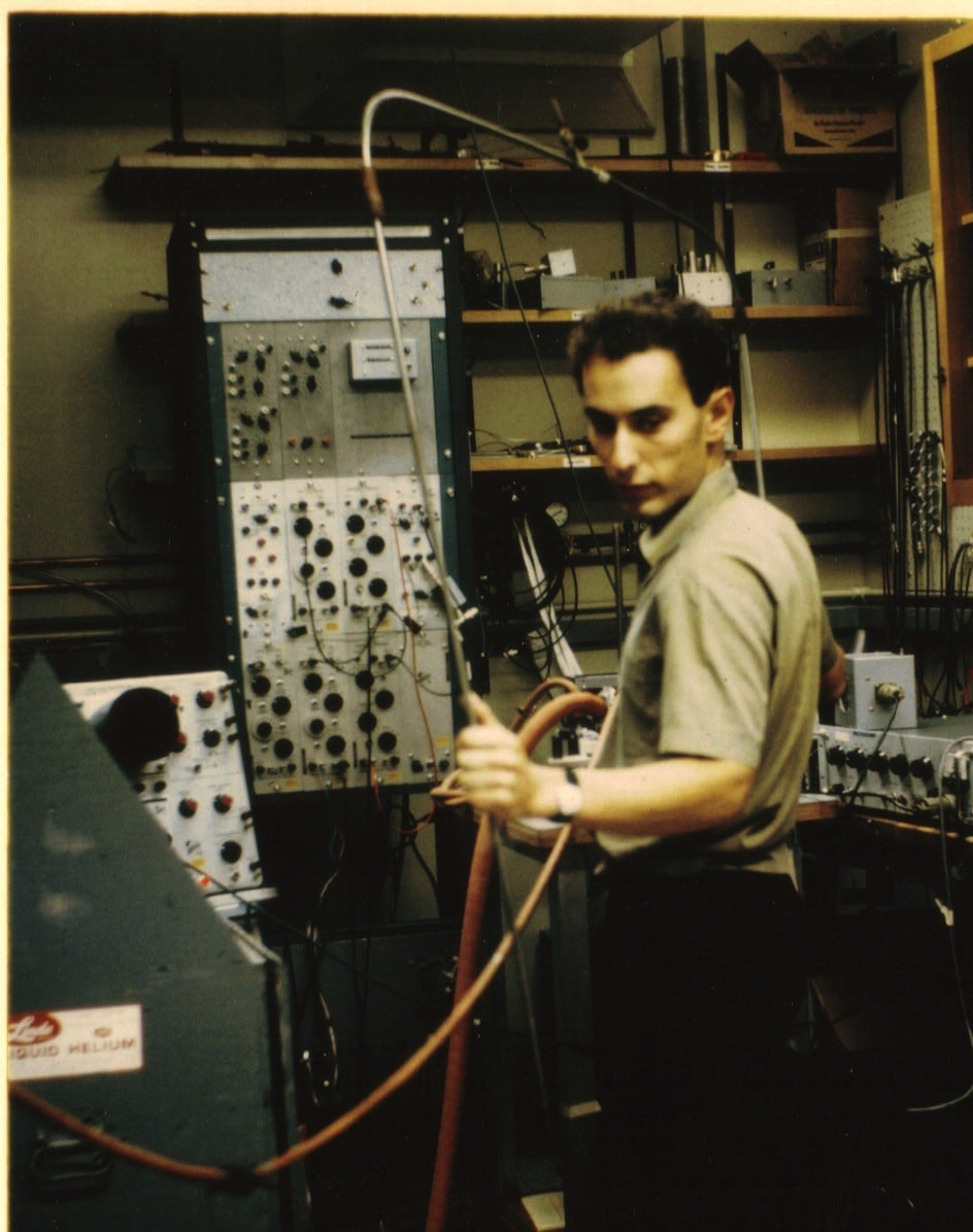 au laboratoire